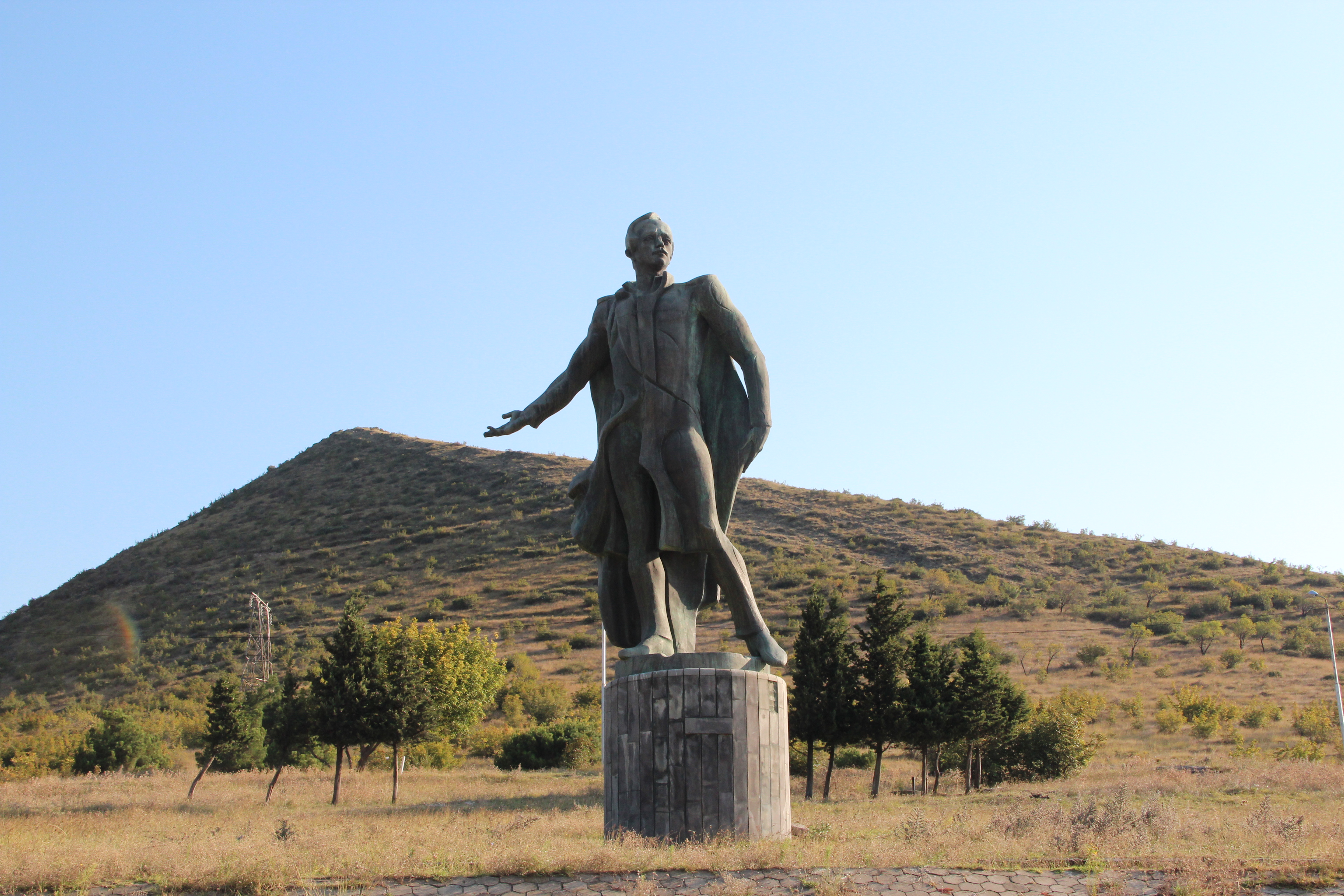 Lermontov, Georgia